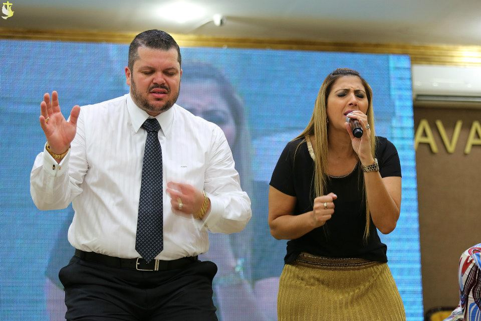 Apóstolo Agenor de Bispa Ingrid Duque. Facebook: 10/03/2013